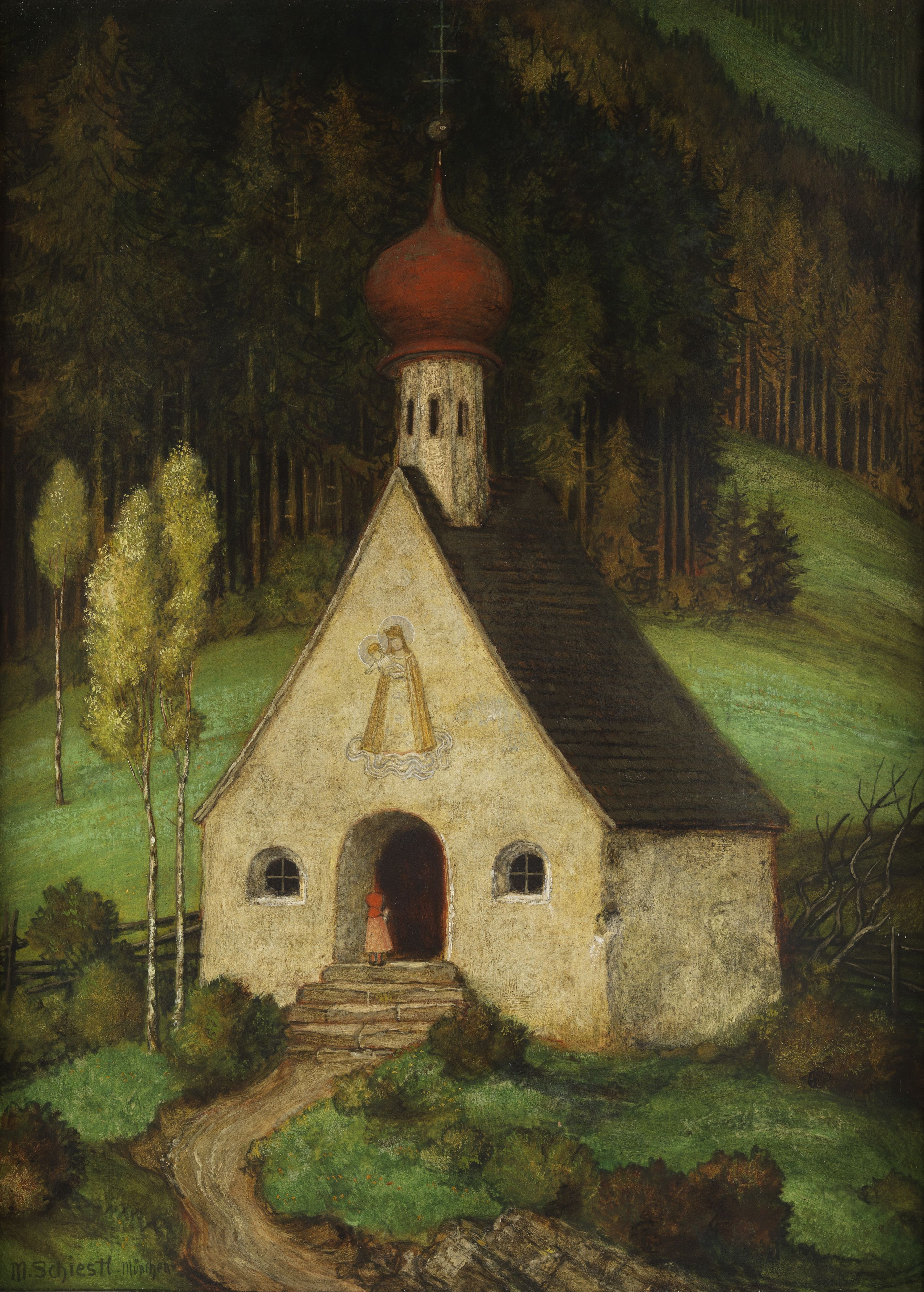 Frau an einer Waldkapelle. Öl auf Sperrholz. 64 x 47 cm.